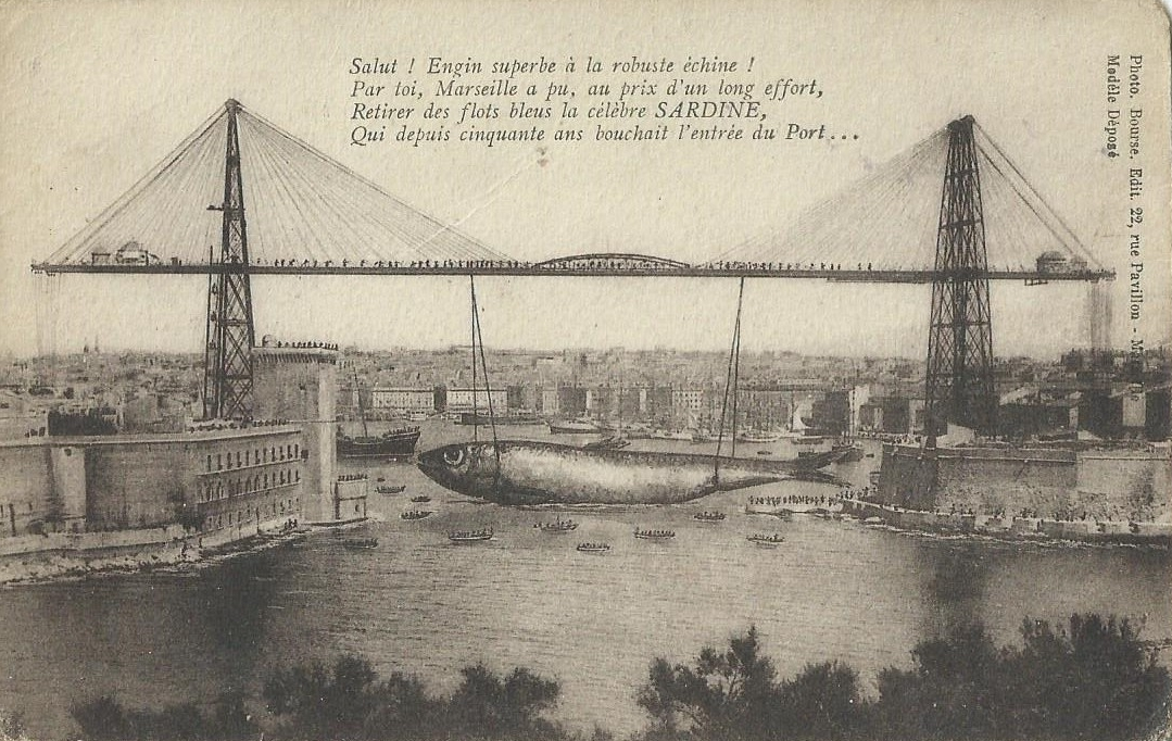 Carte postale, gravure de la "Sardine" du port de Marseille sortie de l'eau, accrochée au pont transbordeur.